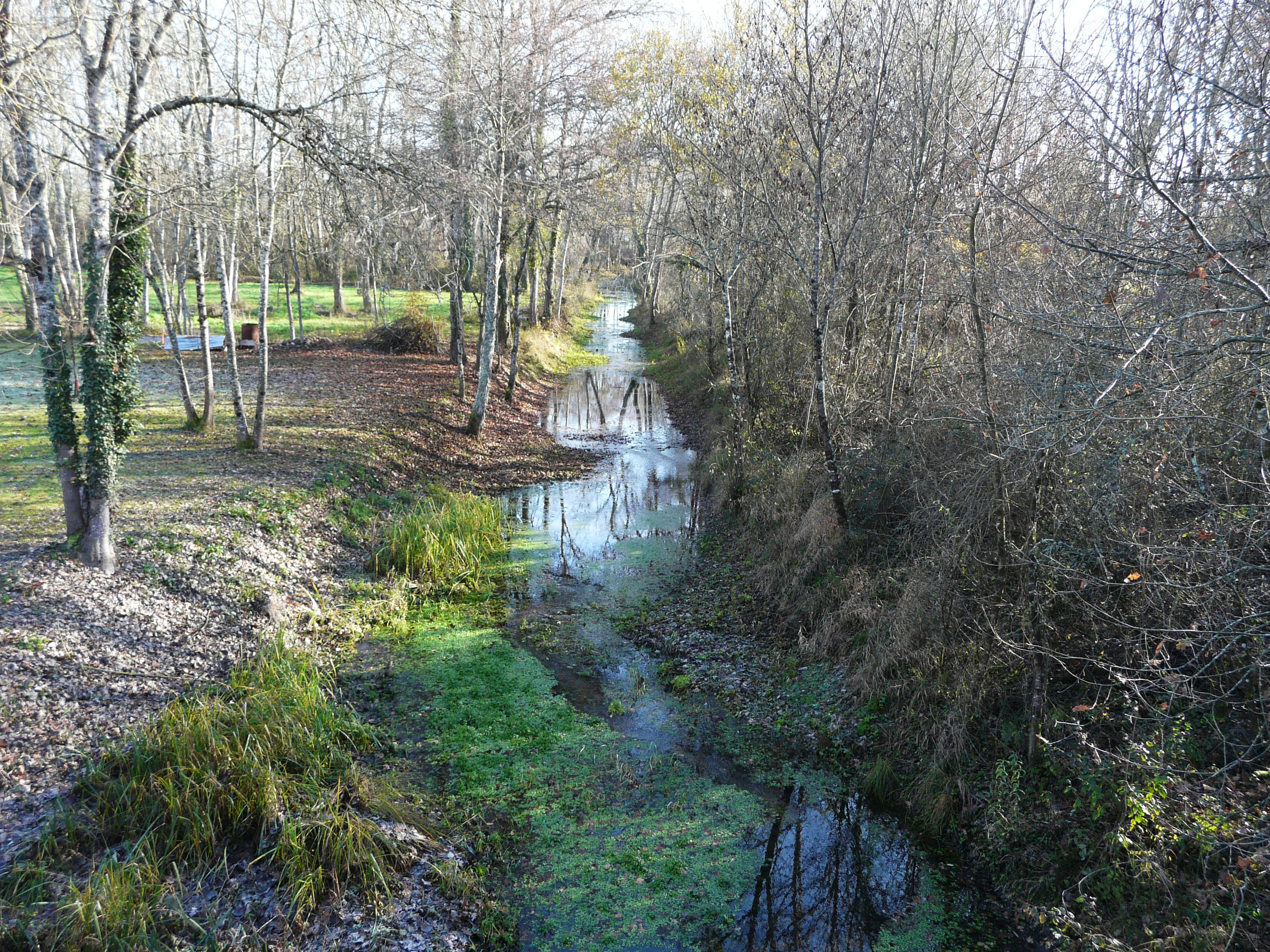 Le Vern en amont du pont de la route départementale 4, Manzac-sur-Vern, Dordogne, France.